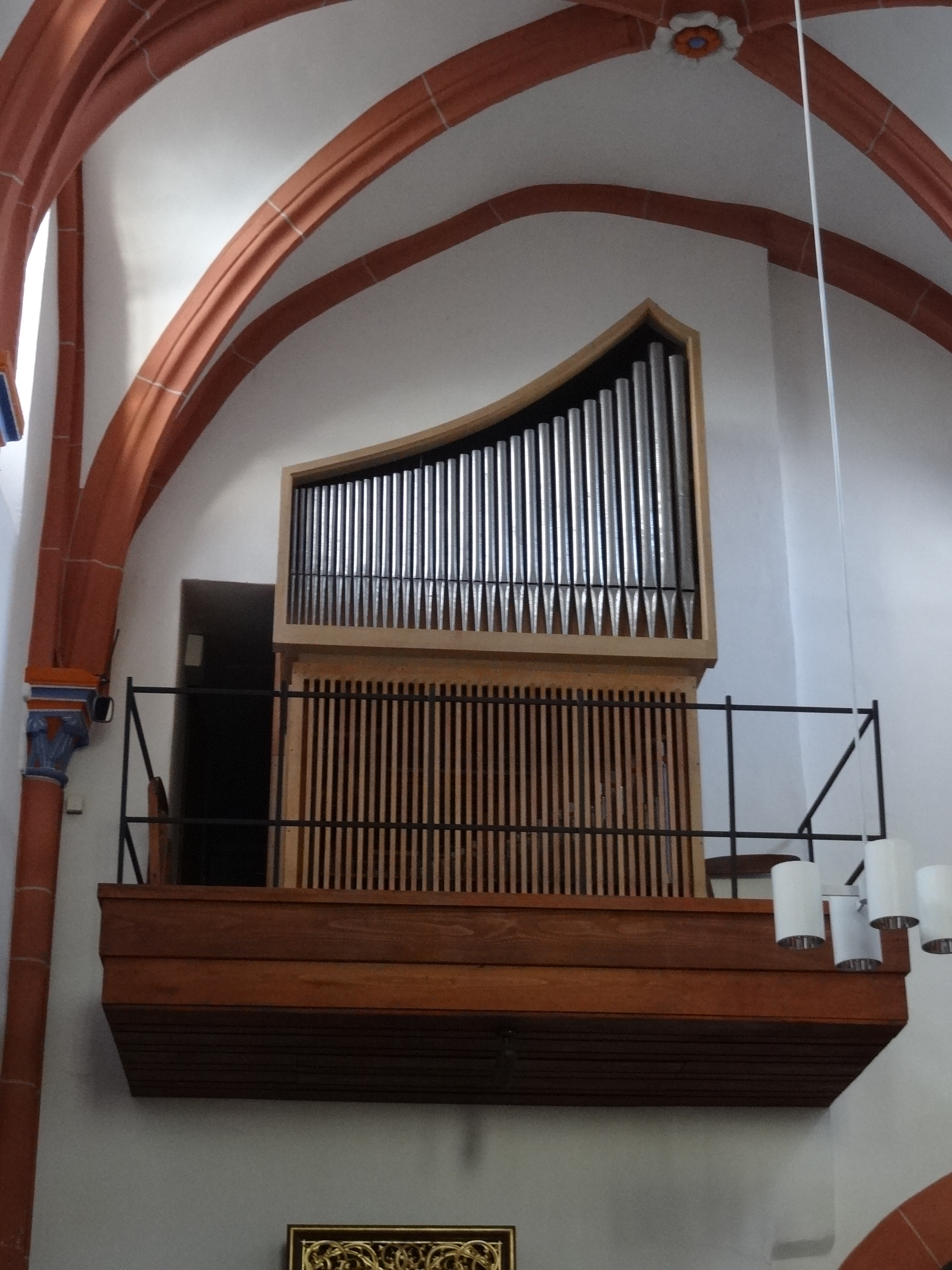 Evangelische Kirche Geiß-Nidda